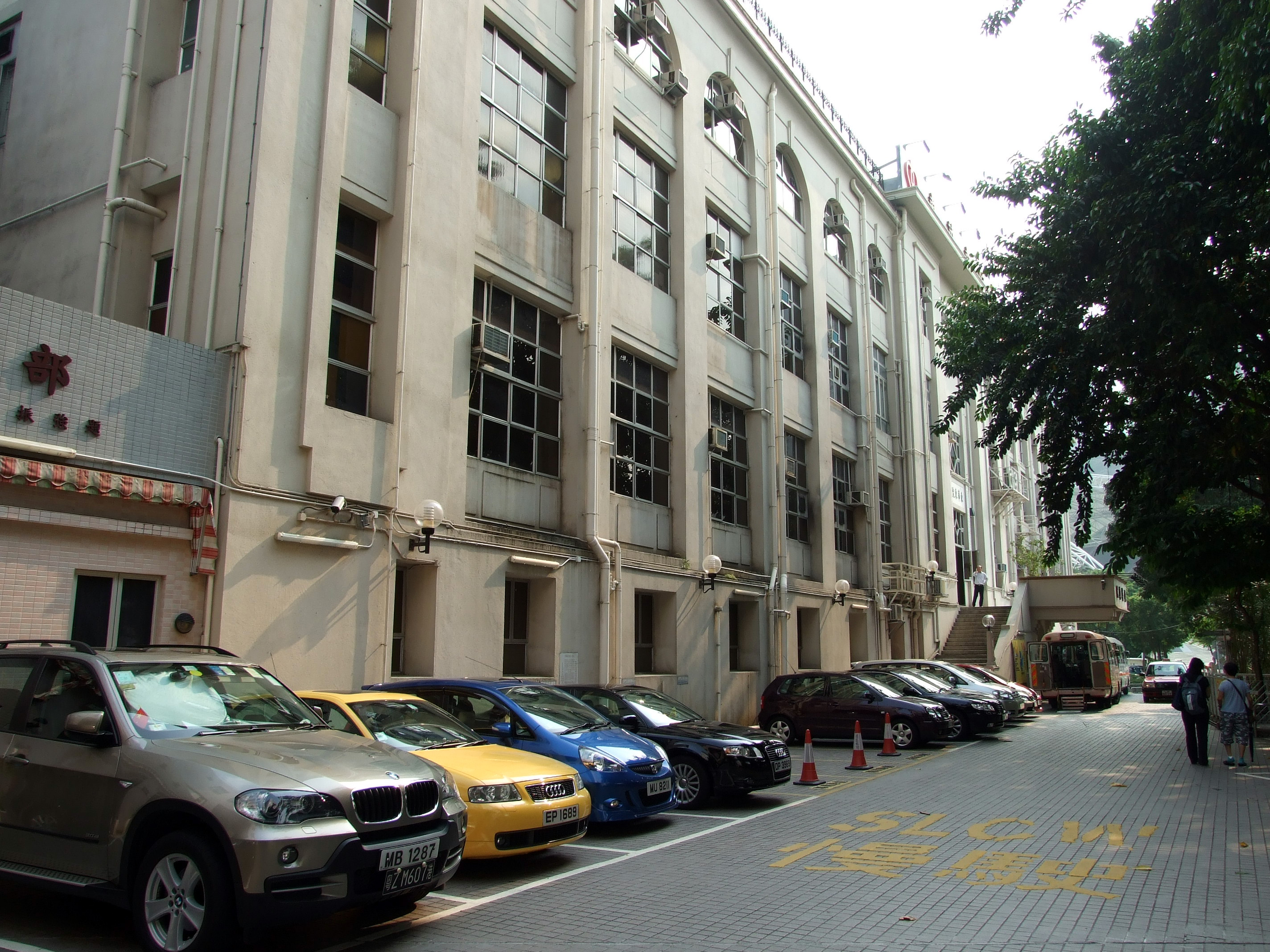 中文（香港）: 東華東院舊翼